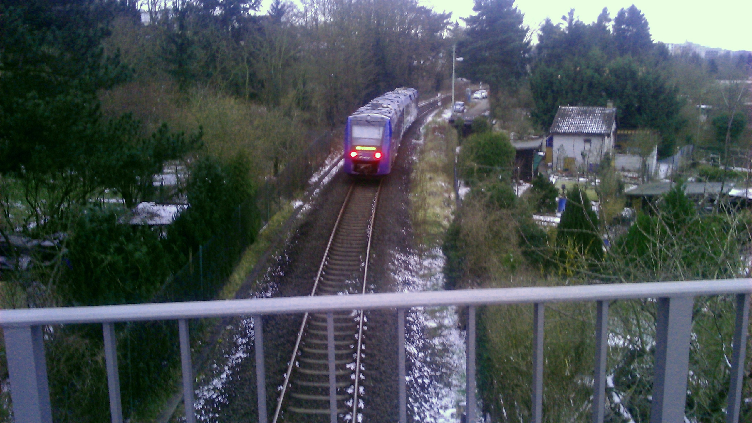 RE 13 nach Kirchheimbolanden auf der Bahnstrecke Mainz - Alzey bei Mainz-Gonsenheim